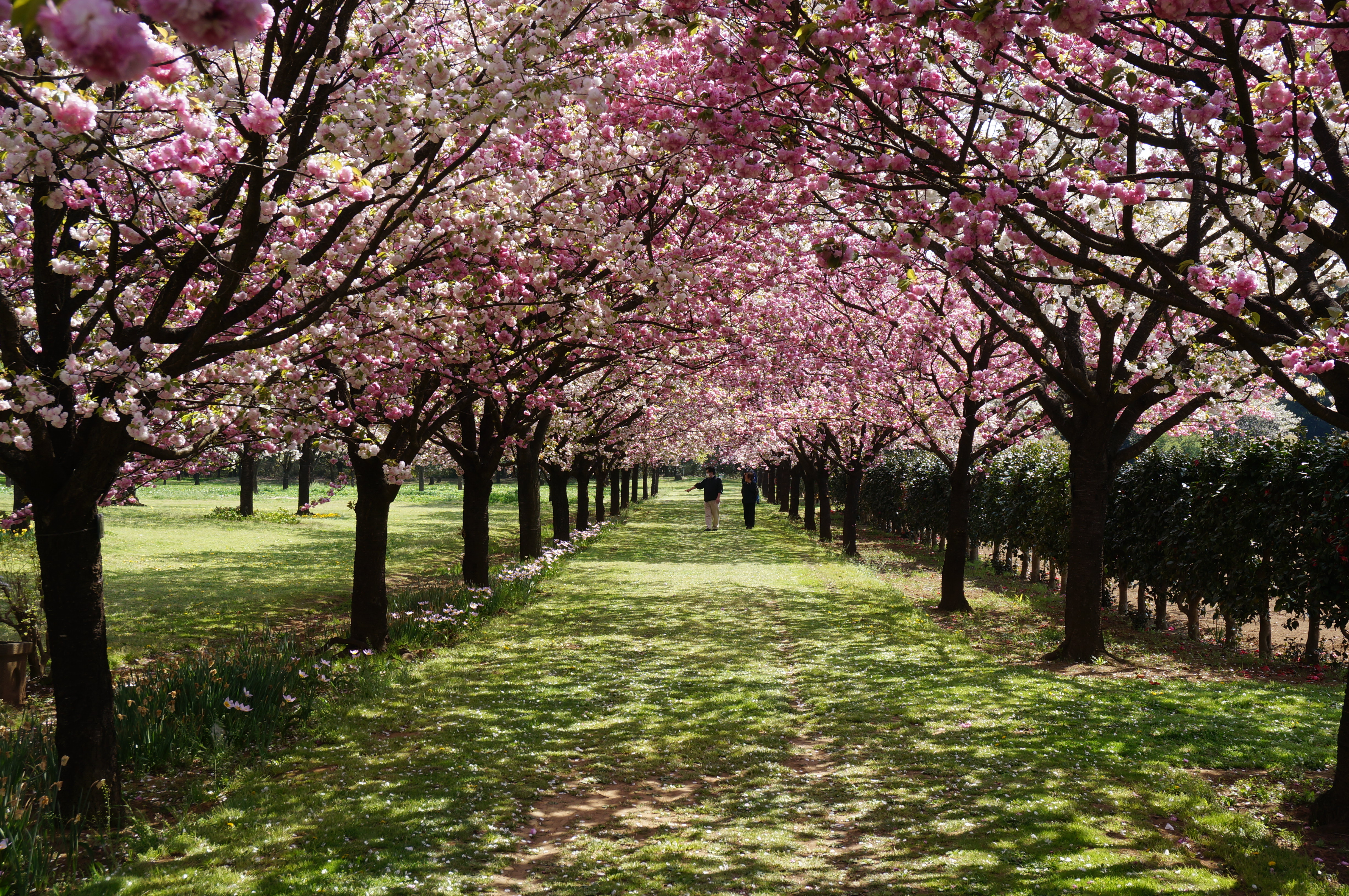 Cherry blossom "Kouka" and "Hanagasa". The Flower Association of Japan. Yūki city, Ibaraki prefecture, Japan.